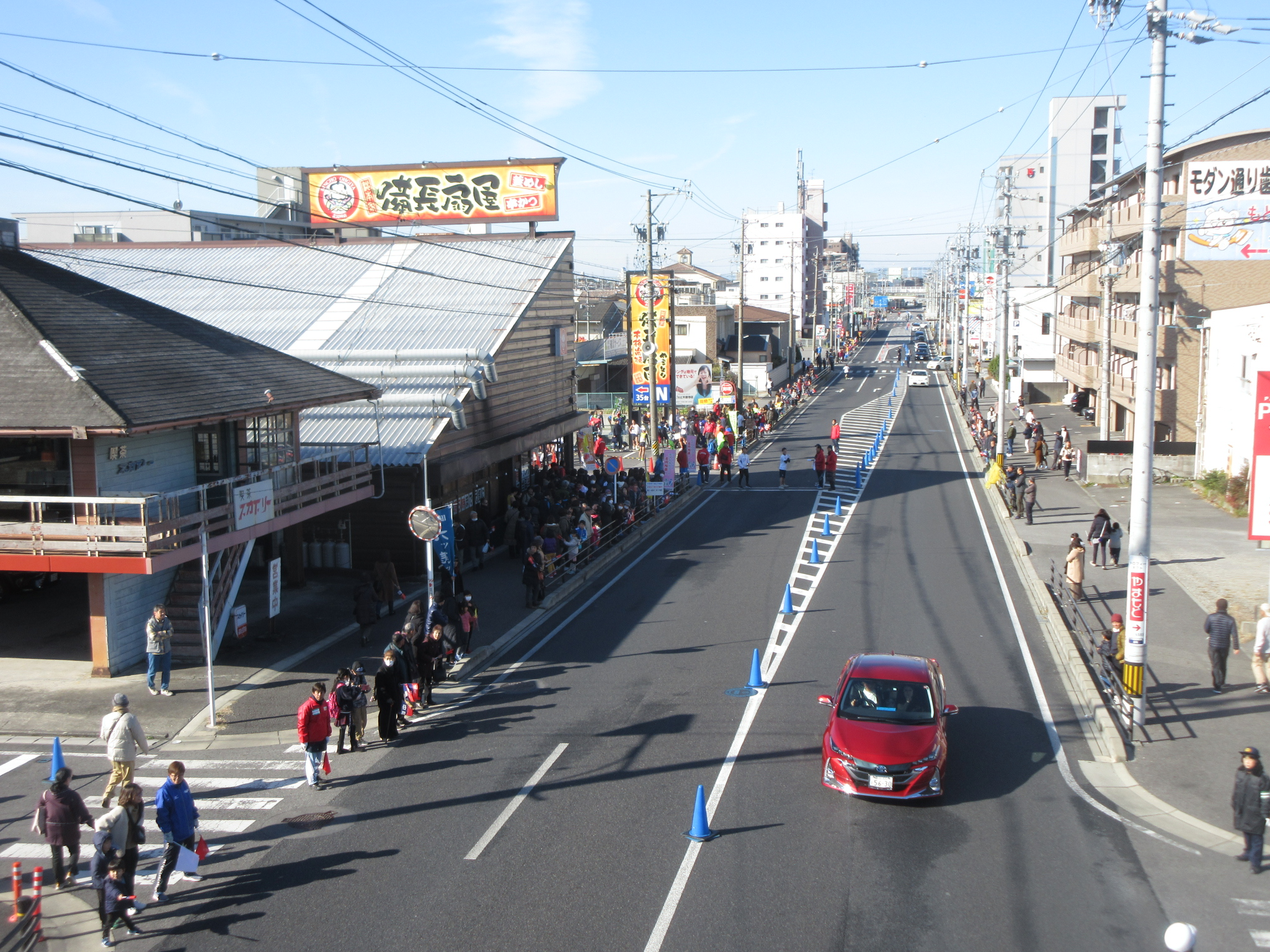 愛知県道56号名古屋岡崎線、岡崎市錦町